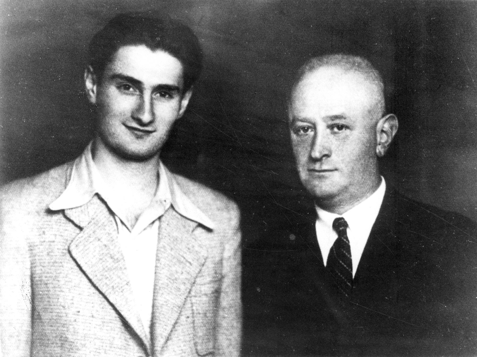 "דוד סטוליאר, משמאל, הניצול היחיד מן האניה סטרומה, בחברת ברוד עסקן יהודי - קושטא." פברואר 1942